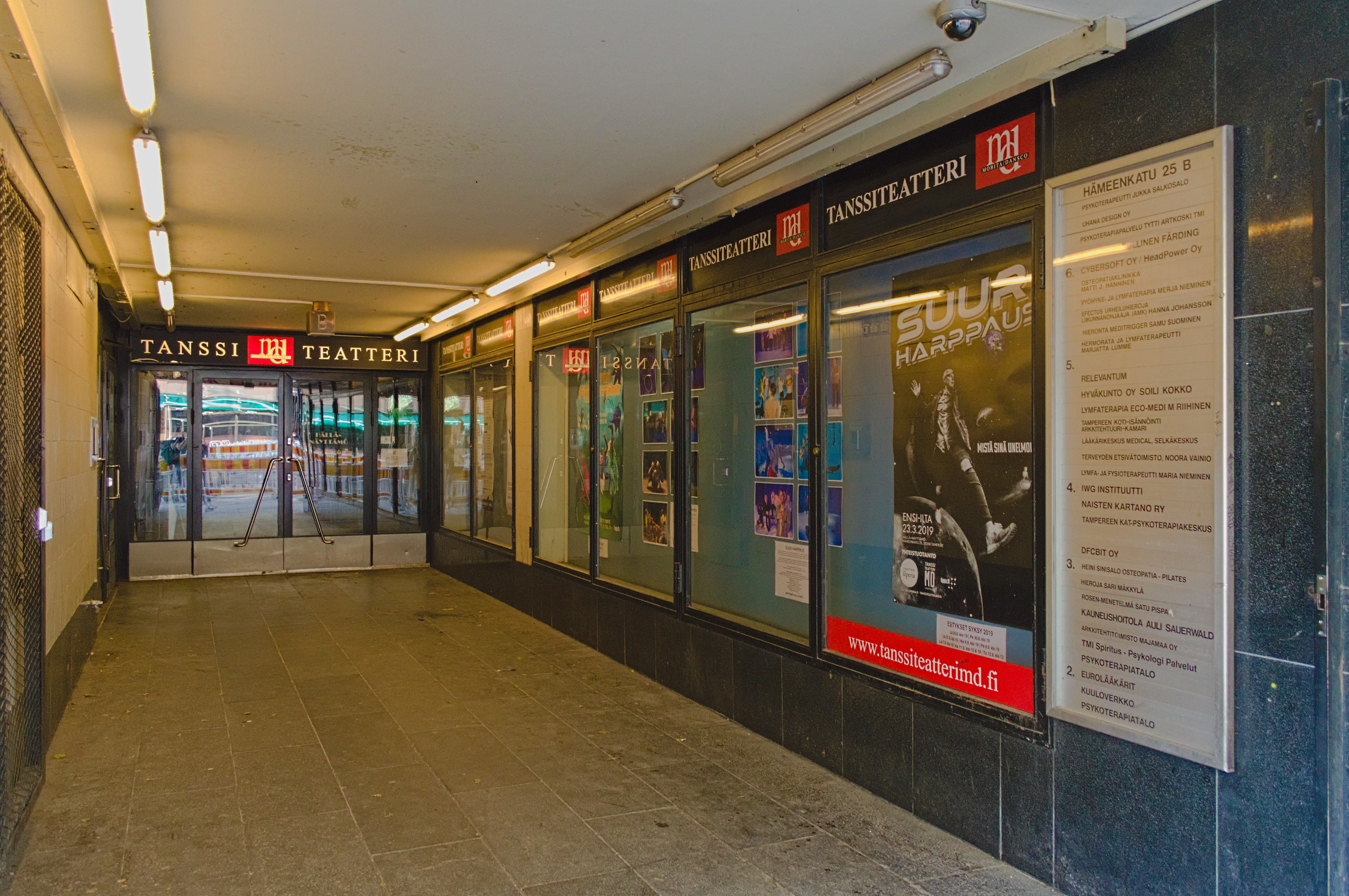 Tanssiteatteri MD:n sisäänkäynti